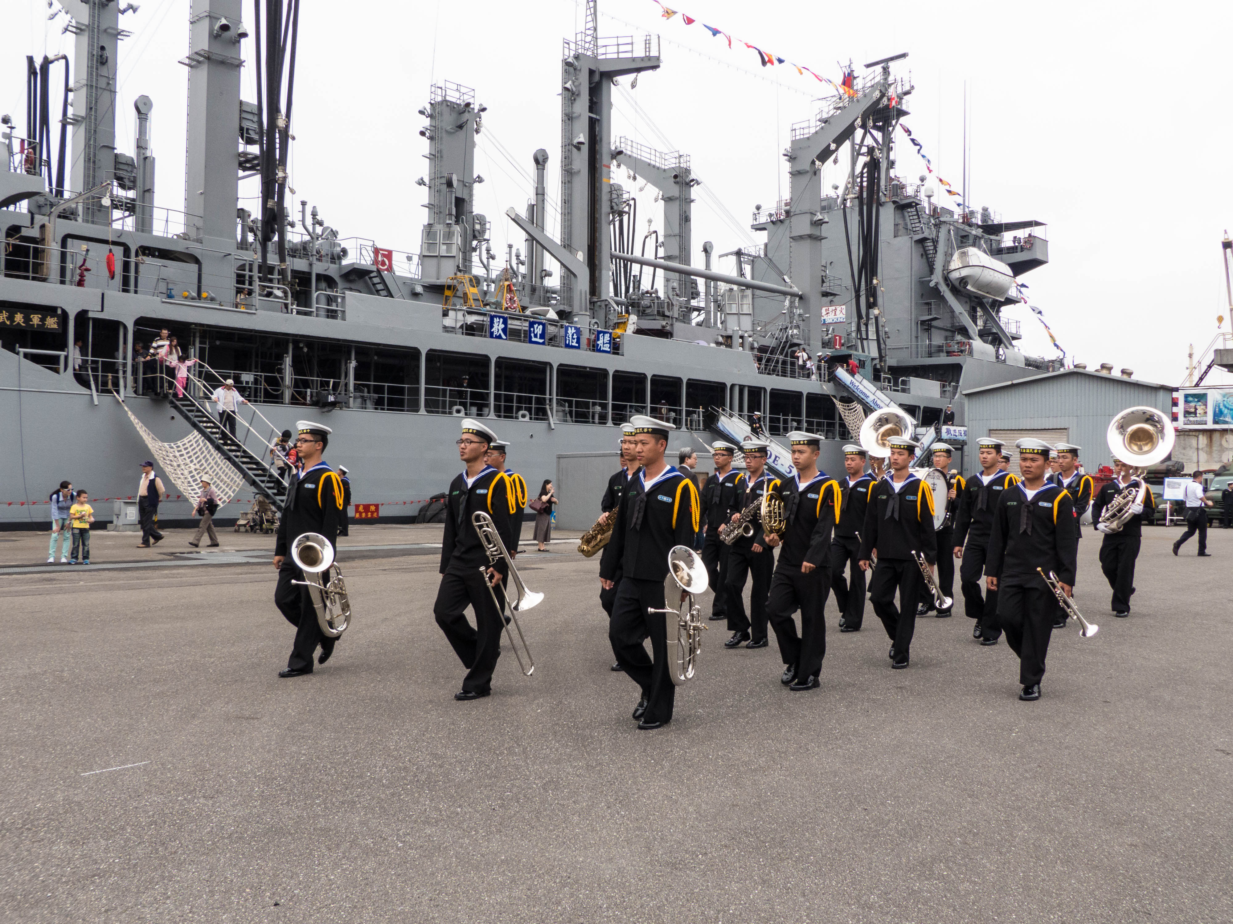 整隊往南移動的海軍樂隊，後方是油彈補給艦武夷（AOE-530）。